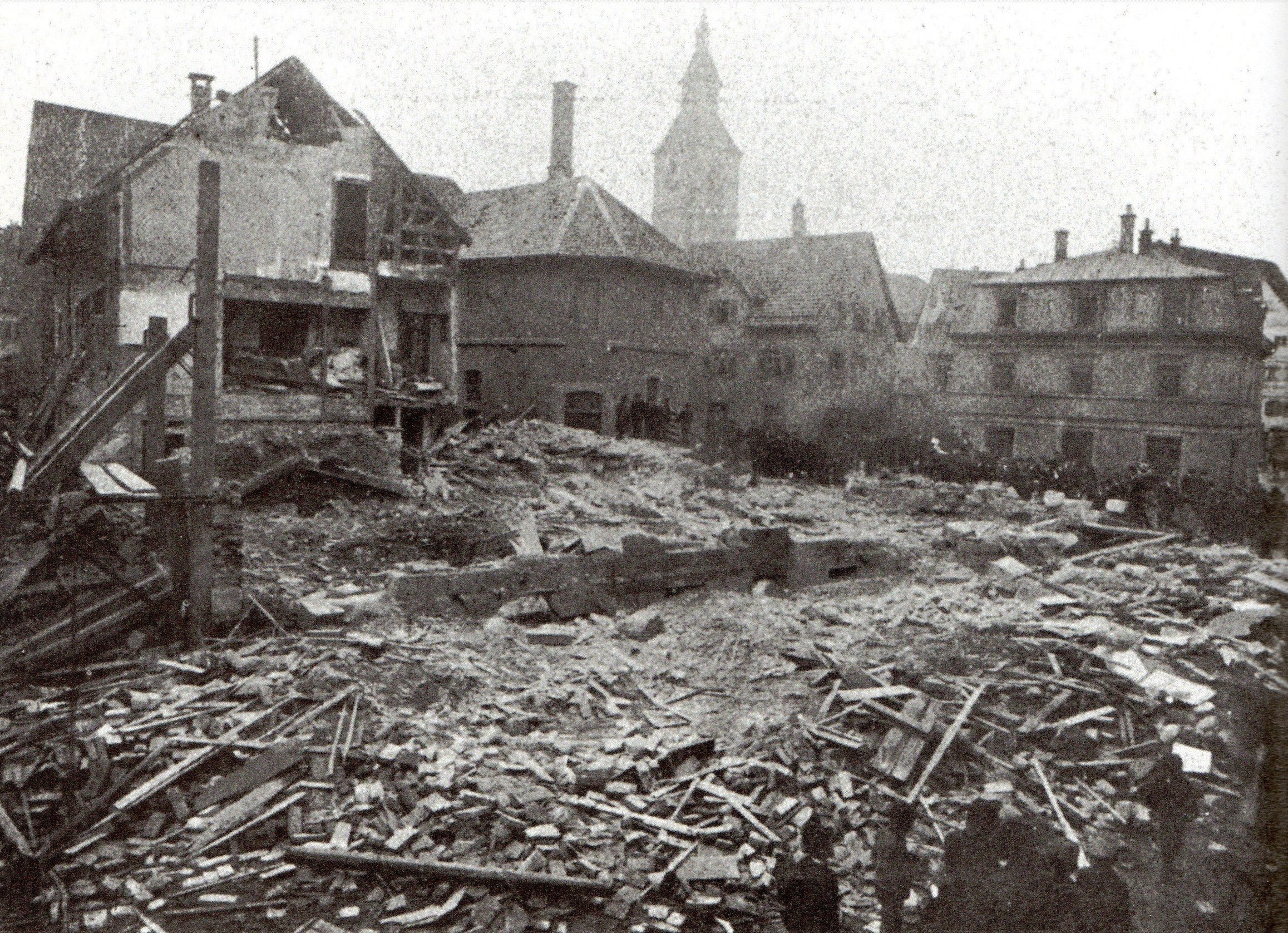 nach dem Einsturz des Gasthofs Hirsch